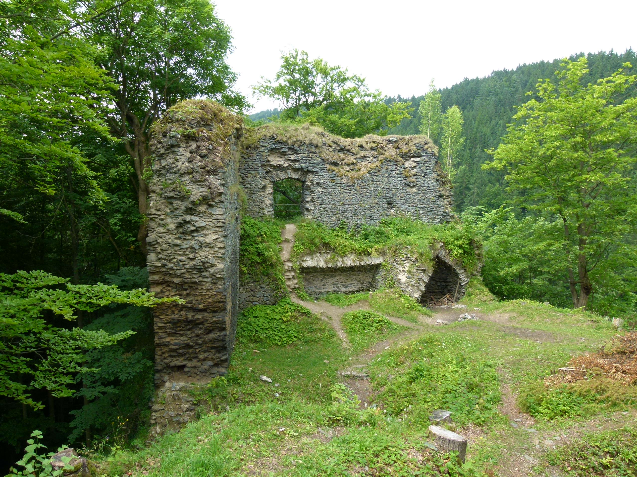 Hrad Navarov, zřícenina, Zlatá Olešnice